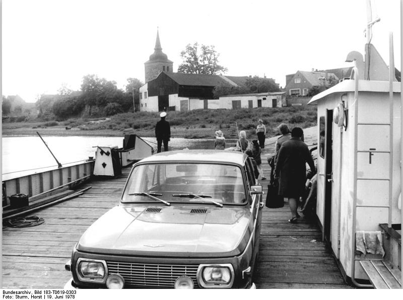 Magdeburg, Anlegestelle, Fähre Zum Beitrag:Fährmann, hol´über!-Die Fährstellen in der Elbenstadt Magdeburg-ADN-ZB Sturm-19.6.78-bb-Den Magdeburger Stadtteil Westerhüsen verbindet eine Gierfähre mit dem gegenüberliegenden Naturschutzgebiet Kreuzhorst. Der Prahm, der gut und gerne seine 20 Tonnen Last tragen kann, ist mitten in der hier mehr als 200 Meter breiten Elbe sozusagen "an die Kette gelegt", hängt breitseit an einem in Strommitte verankerten langen Drahtseil.Je nach dem Winkel, den der Fährmann mittels Winden der Fähre zur Strömung gibt, drückt die Wasserströmung das Fahrzeug nach rechts oder links, ihm als Antriebskraft dienend.(Bitte beachten Sie hierzu auch T0619-300N-302N und 304N)